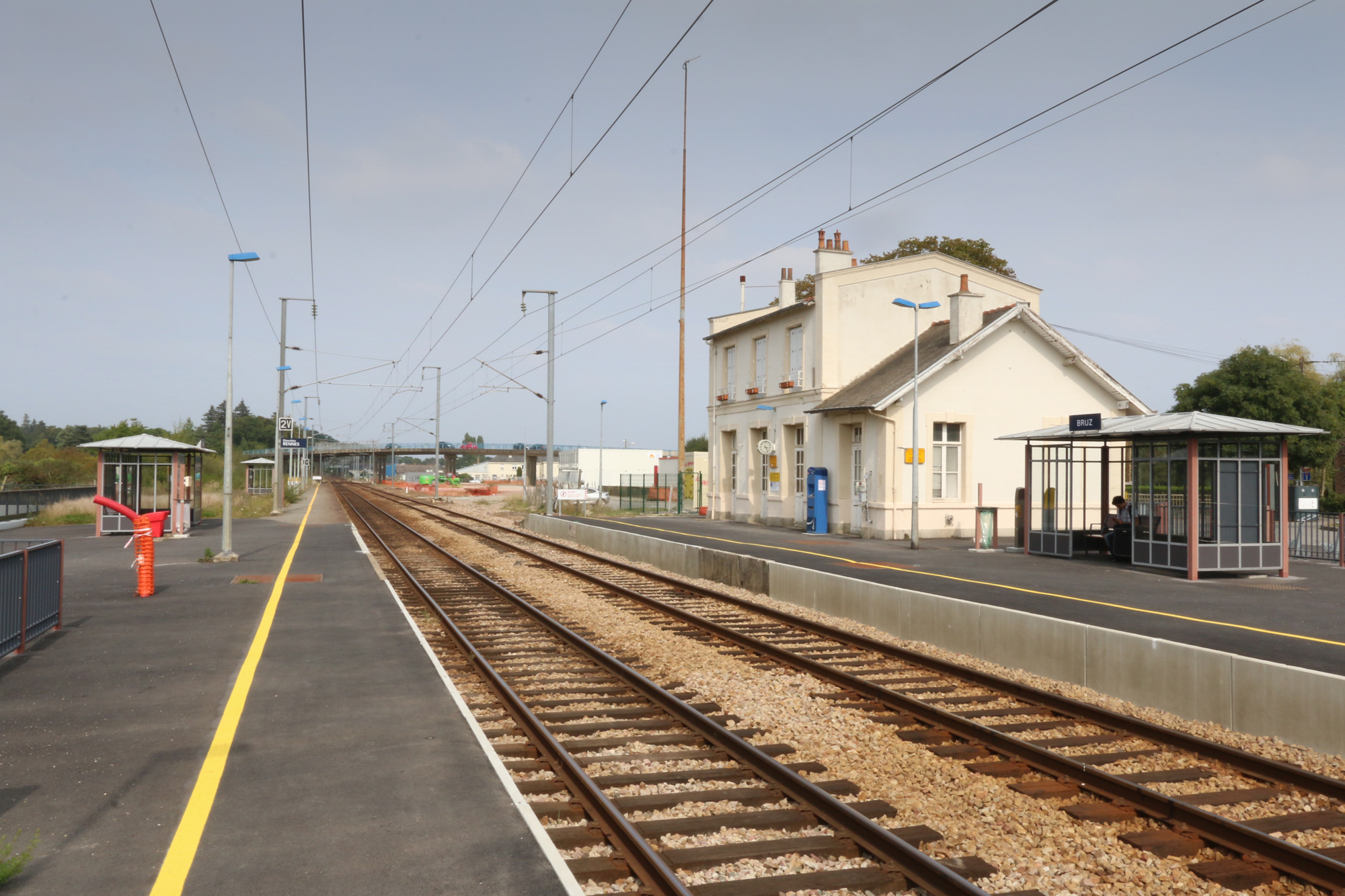 Gare SNCF de Bruz